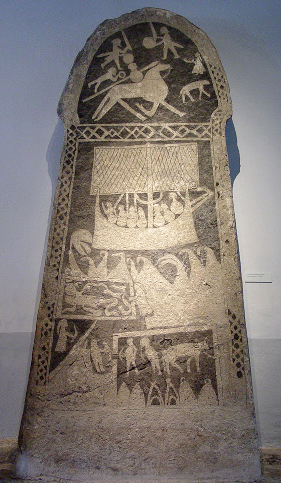 Bildstein im Museum Fornsalen, Visby (Gotland). Höhe ca. 4 m